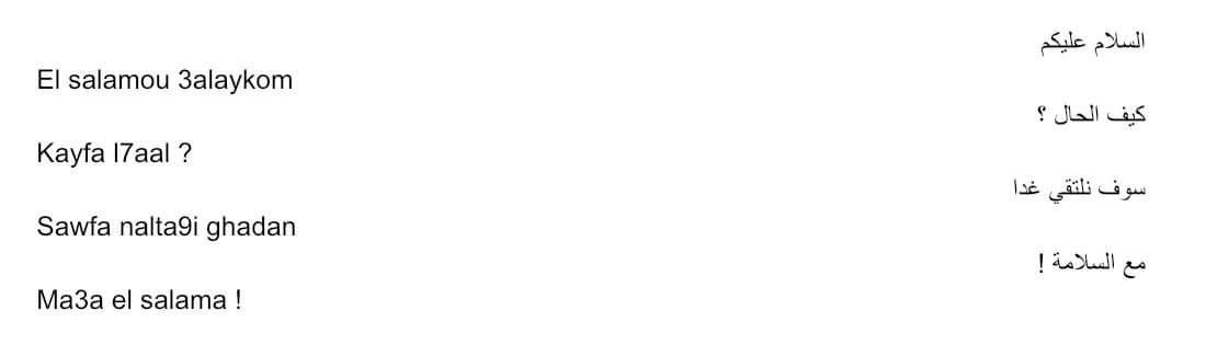 Exemple de quelques formules de dialogue en arabe (classique) avec les correspondances en écriture tchat.